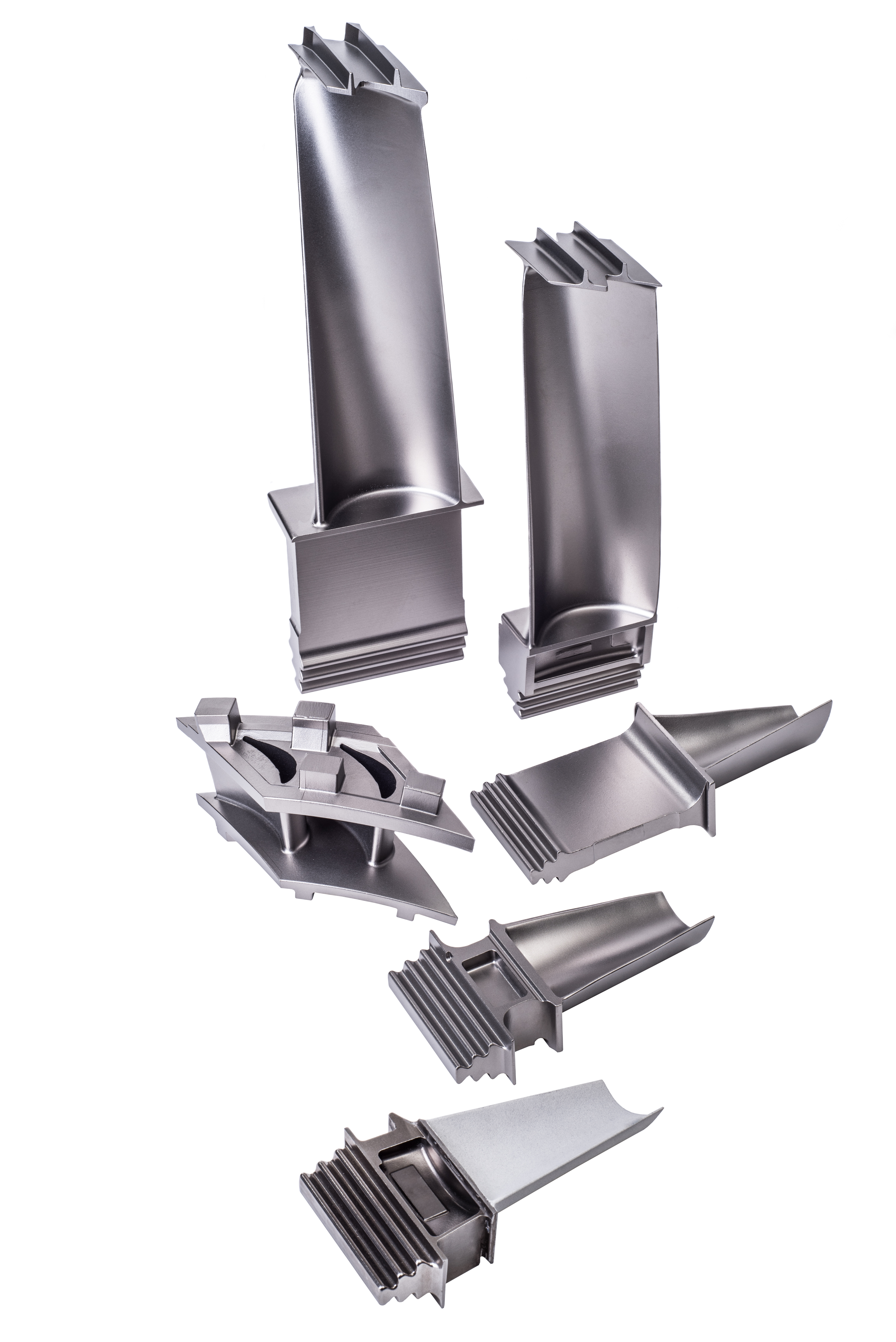 Kompozice lopatek